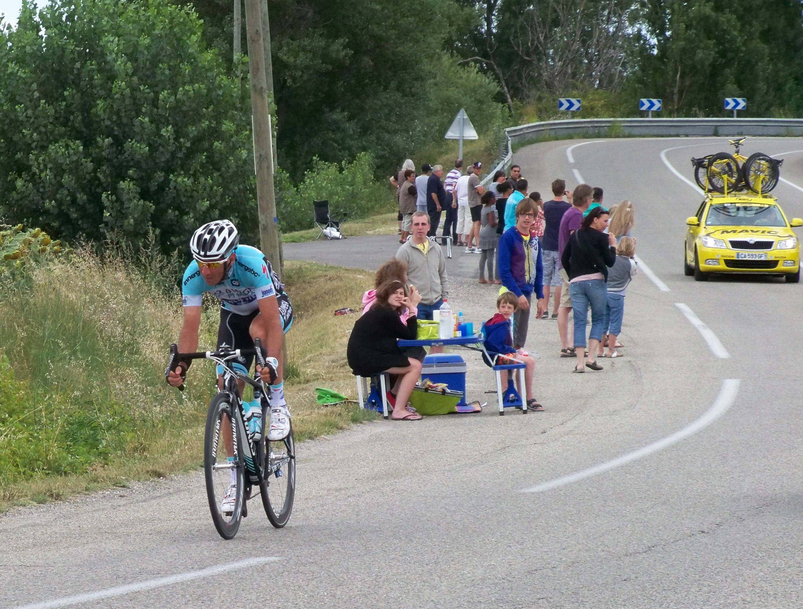 poursuivant lors de la 13ème étape, à Lamotte du Rhône (84)